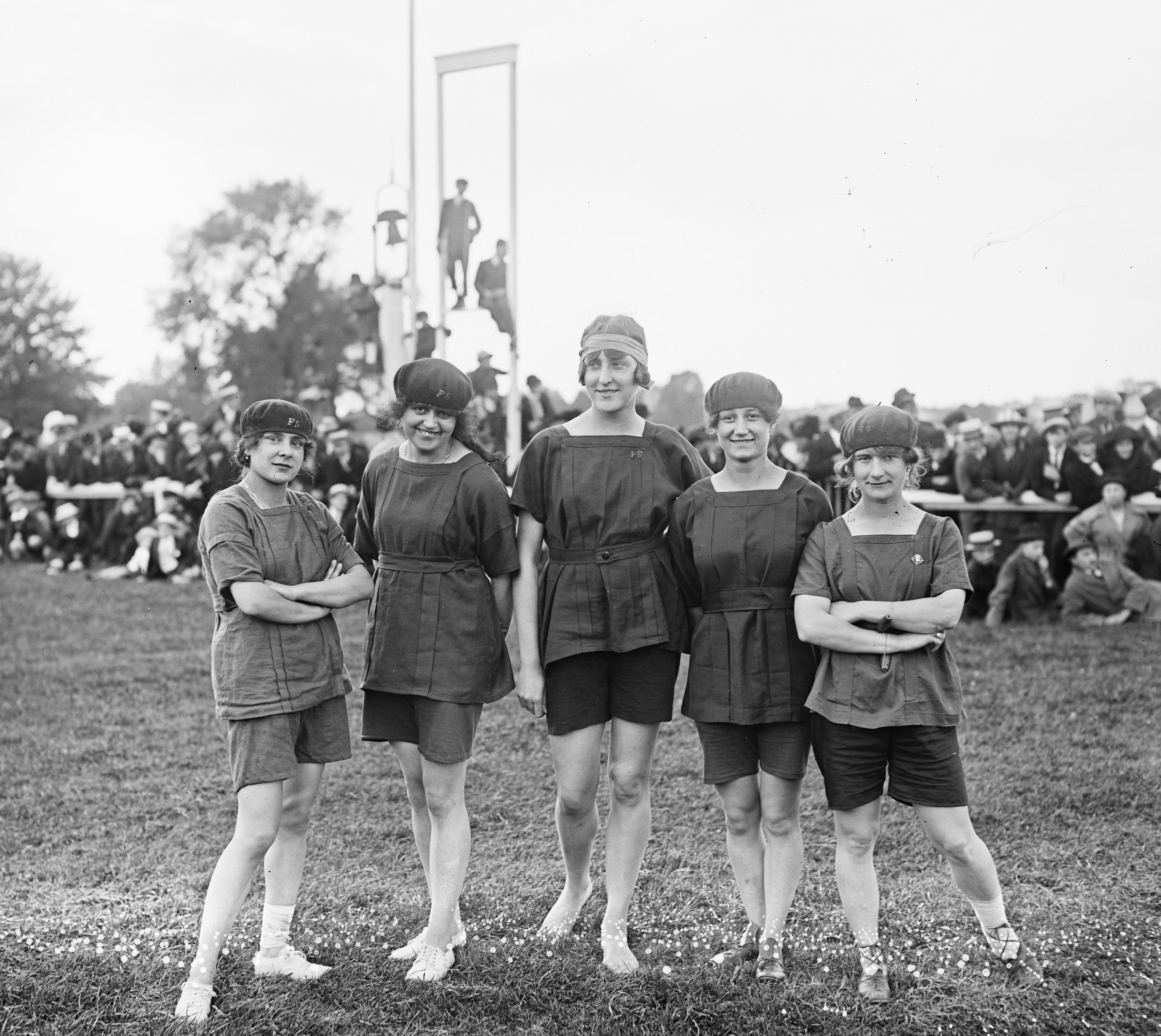 19 sept. 1920, kermesse de Chantilly ; de gauche à droite les athlètes de Fémina Sports Lucie Bréard, Jeanne Janiaud, Frédérique Küsel, Thérèse Brulé, Germaine Delapierre.